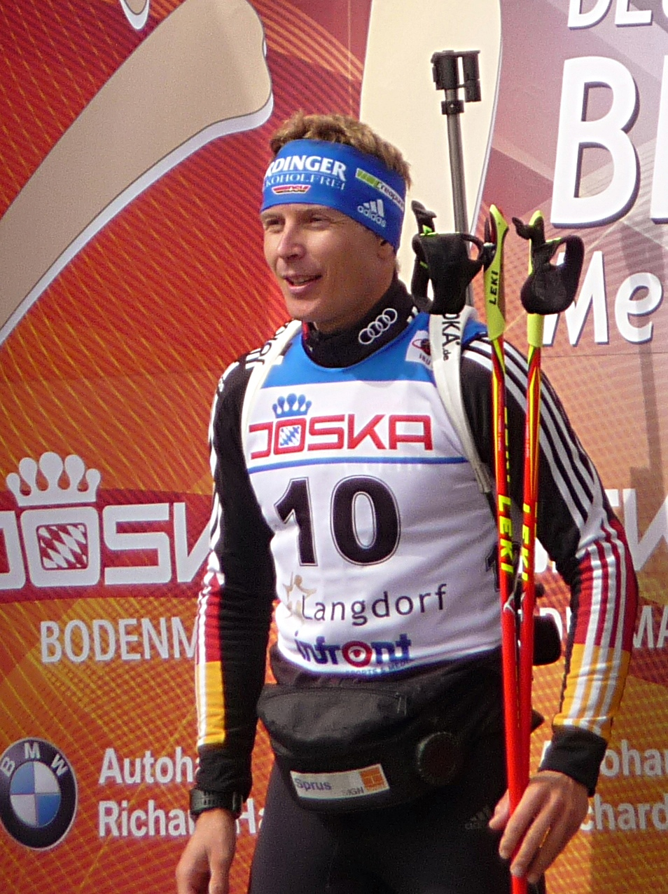 Andreas Birnbacher bei der Deutschen Biathlon-Meisterschaft 2015